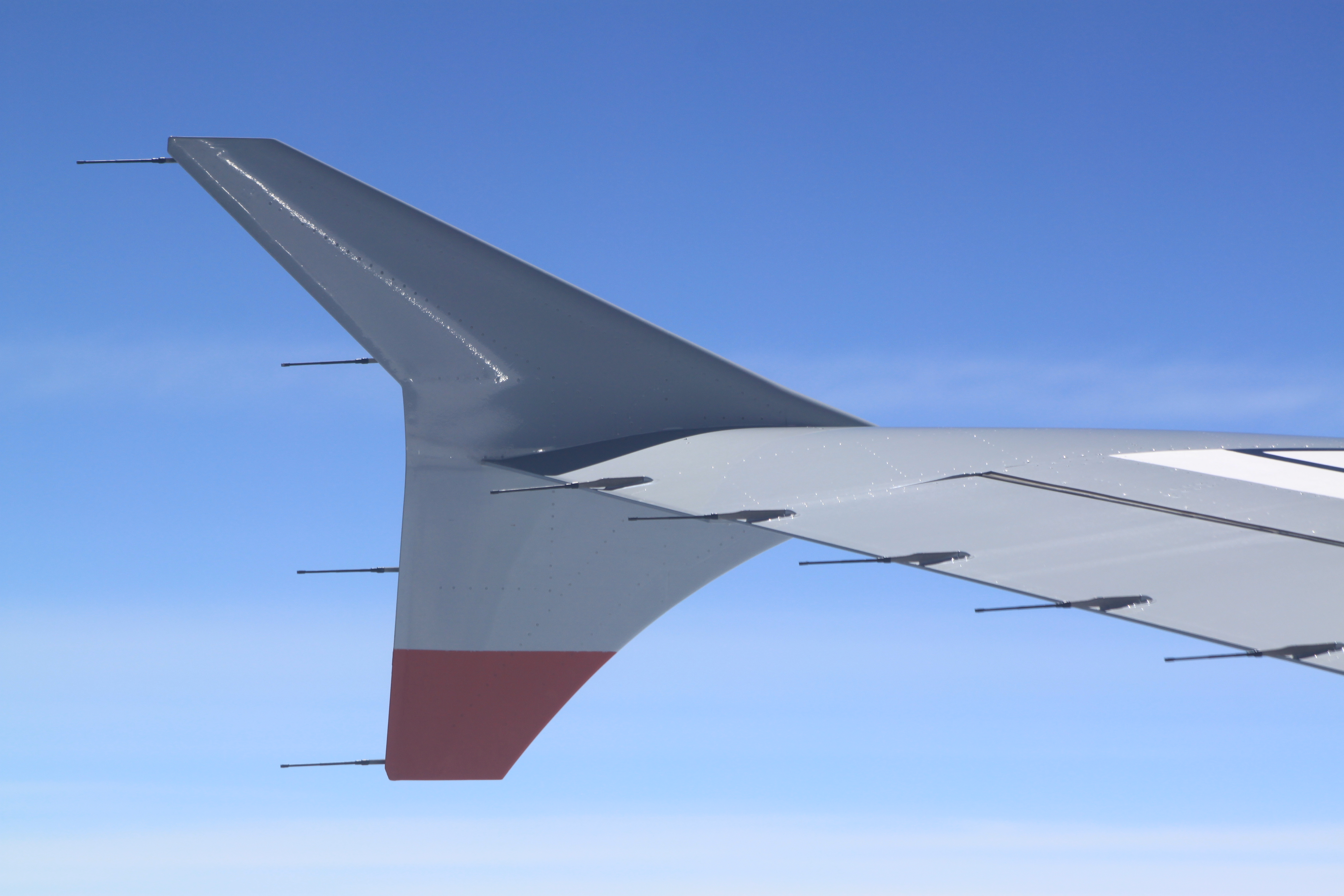 Ein Winglet ("Wingtip Fence") an der Tragfläche eines Airbus A320 der British Airways